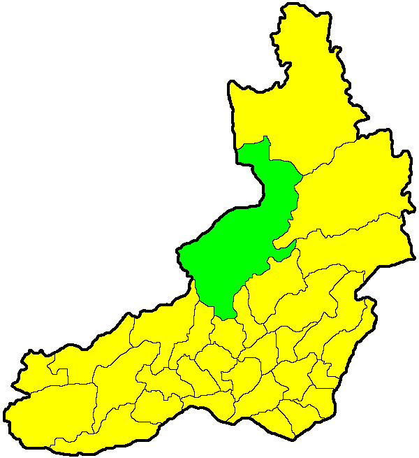 Тунгокоченский район на карте Забайкальского края